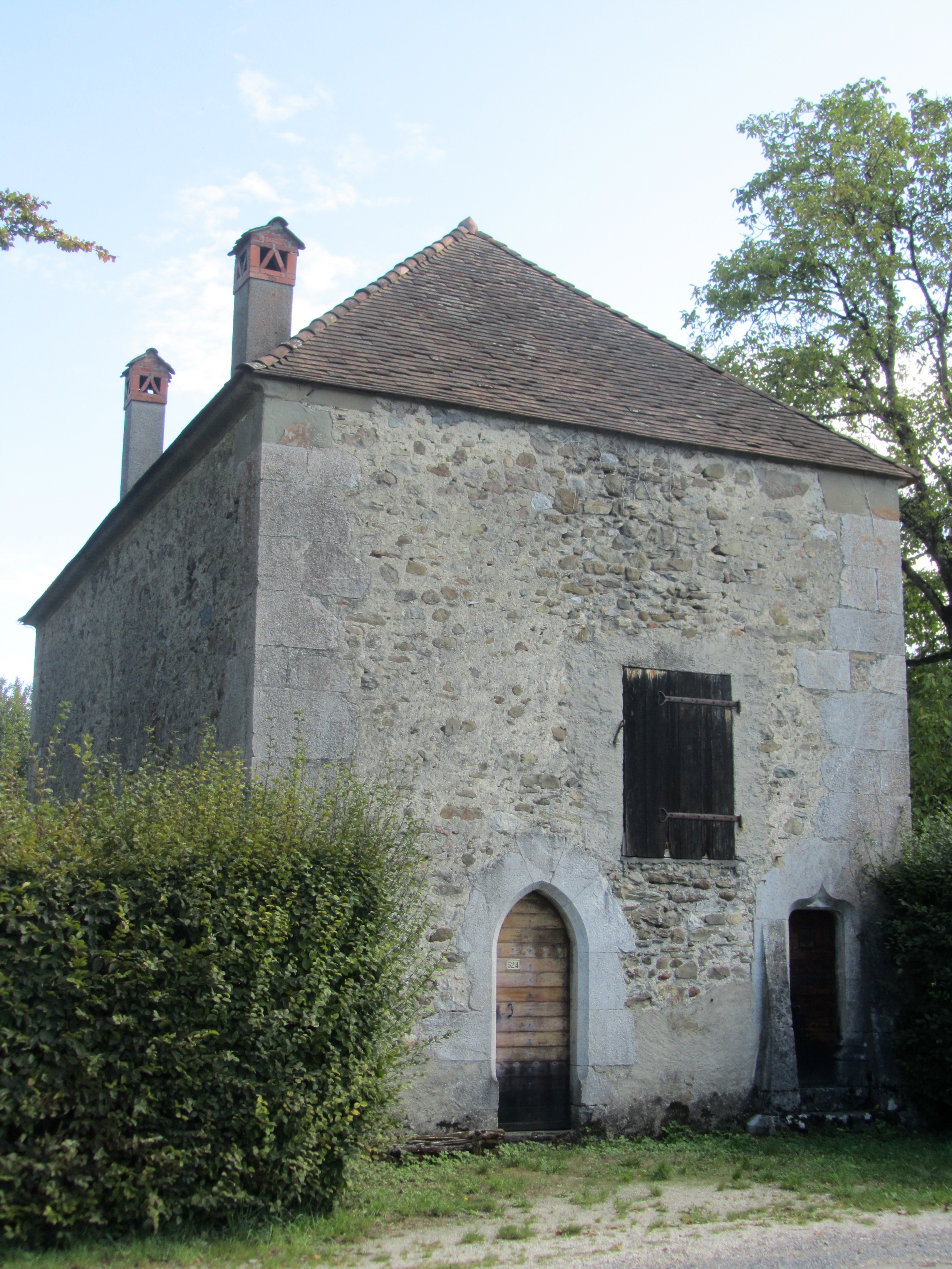 Chapelle de la Madeleine près de Cornier